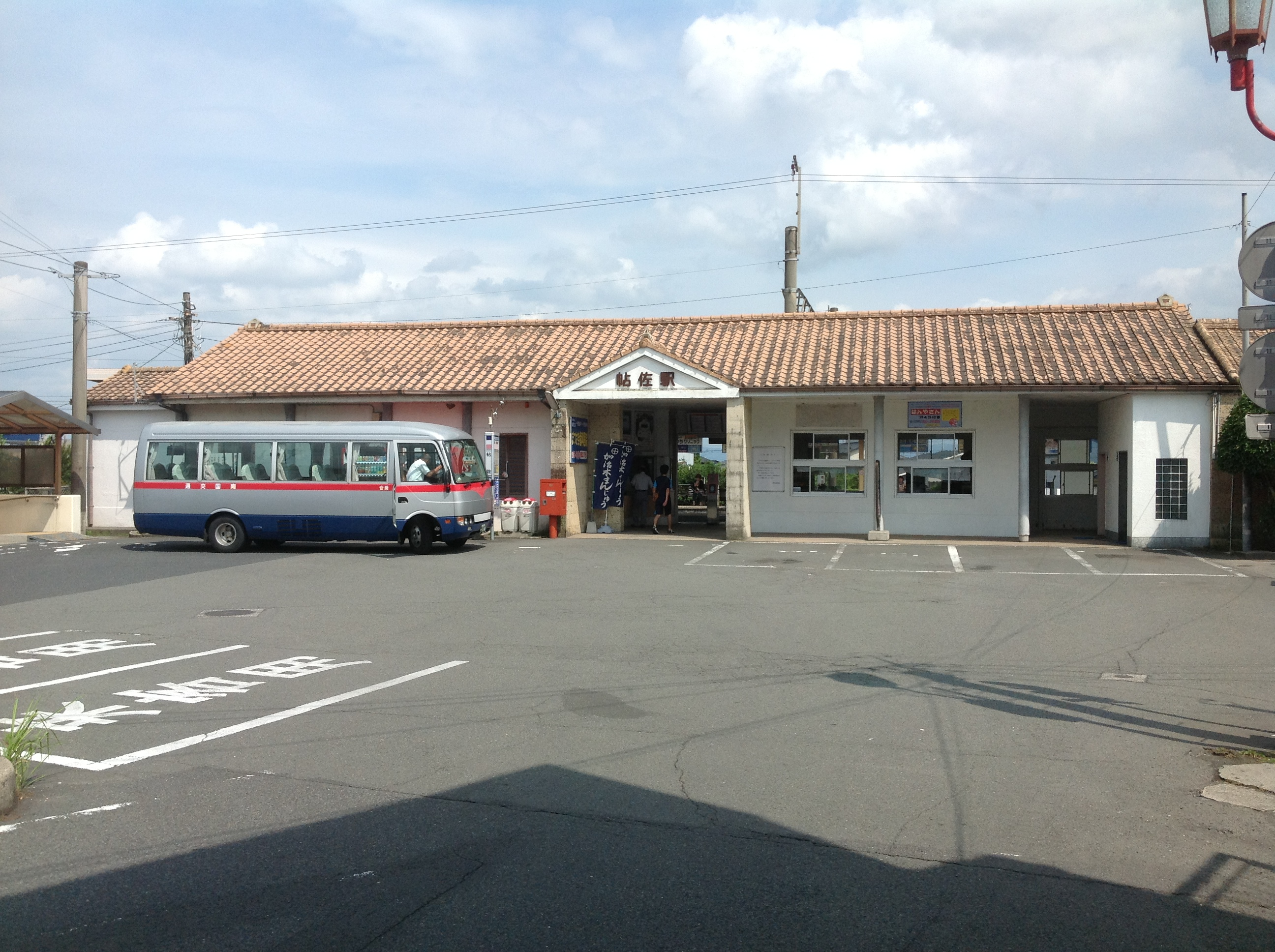 帖佐駅駅舎（2013/7/27）